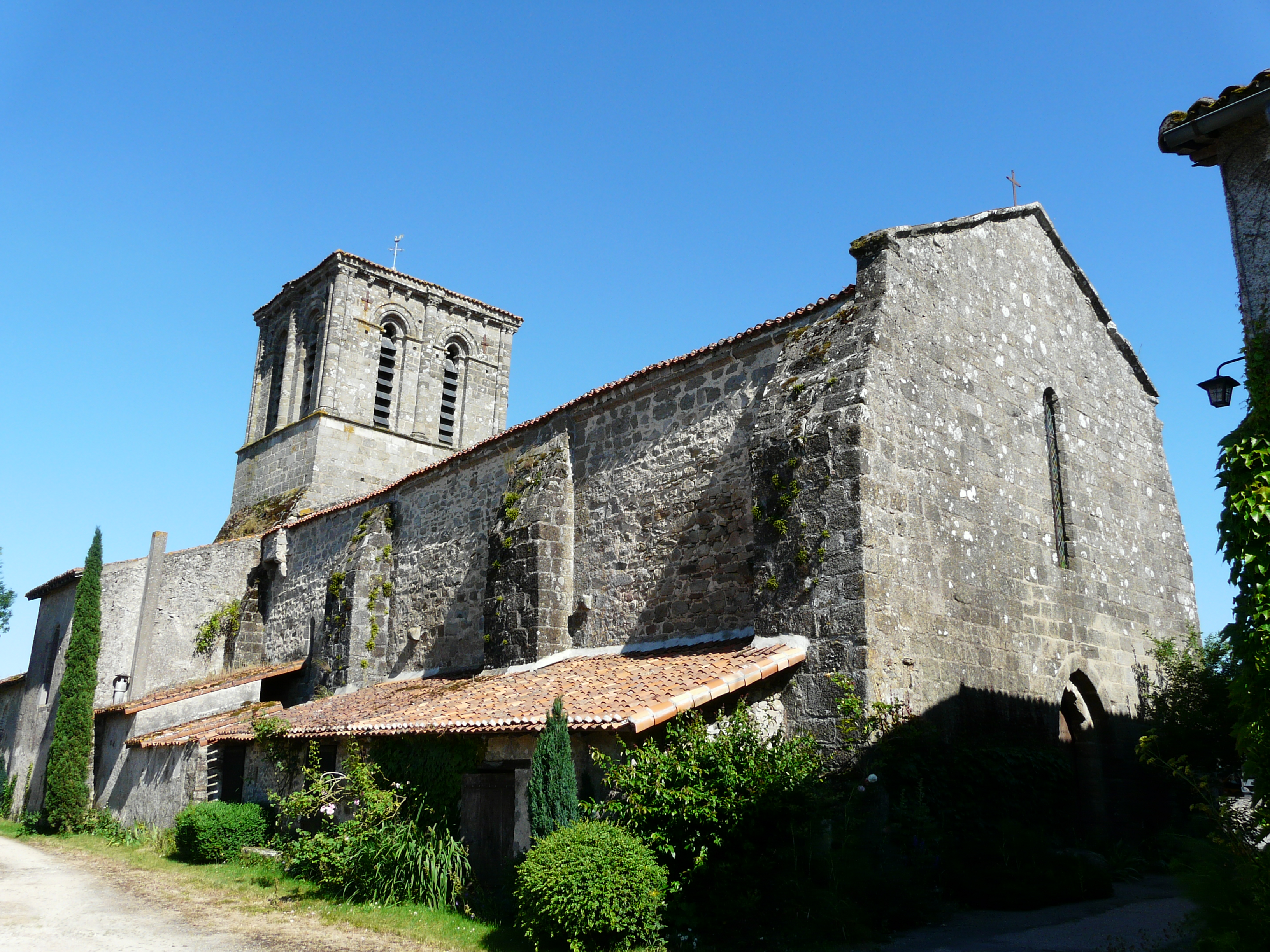 L'église Notre-Dame, La Peyratte, Deux-Sèvres, France